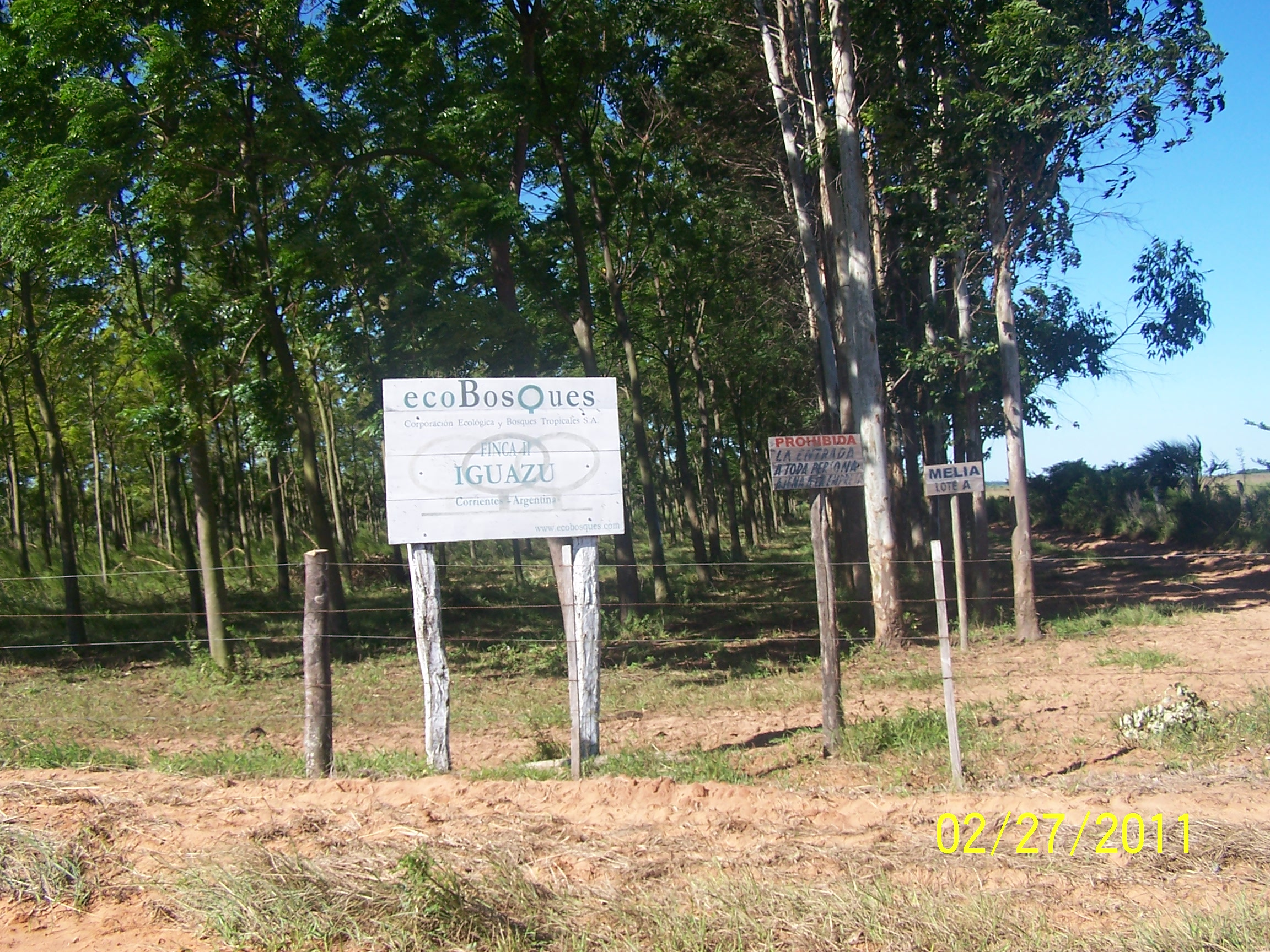 Forestal de Eucaliptus en la Sección Loma Alta de Mburucuyá, en la Provincia de Corrientes. Una de las actividades que está desarrollándose más en esa región en detrimento de la flora y fauna, y fomentando el surgimiento de enfermedades ya conocidas o novas.